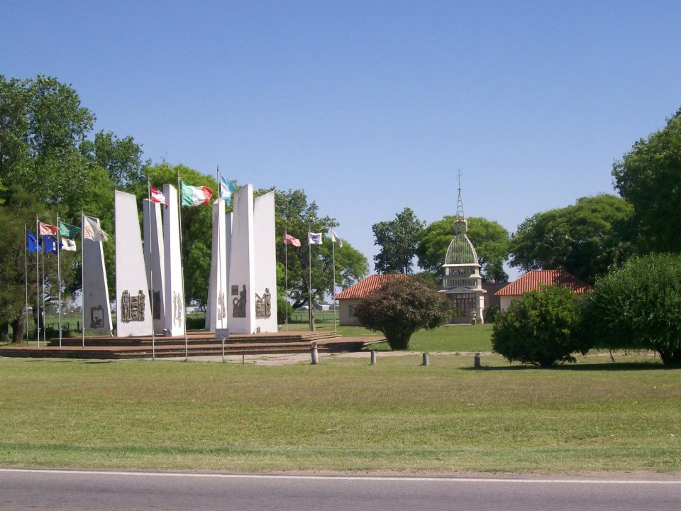 Piemontèis: Monument Nassional a l'Anmigrant Piemontèis, San Fransesch an Argentin-a.